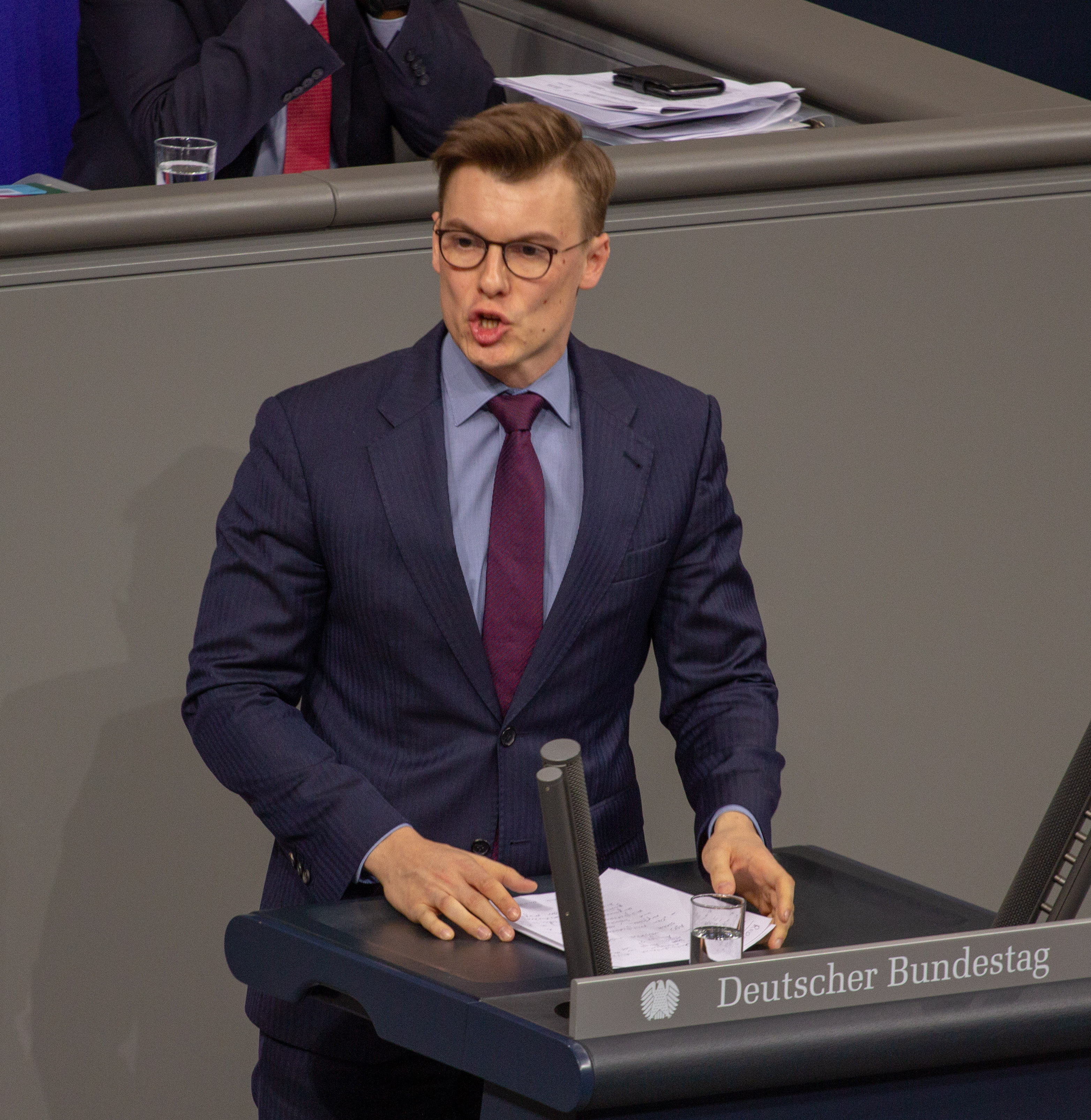 Kai Whittaker, Mitglied des Deutschen Bundestages, während einer Plenarsitzung am 11. April 2019 in Berlin.